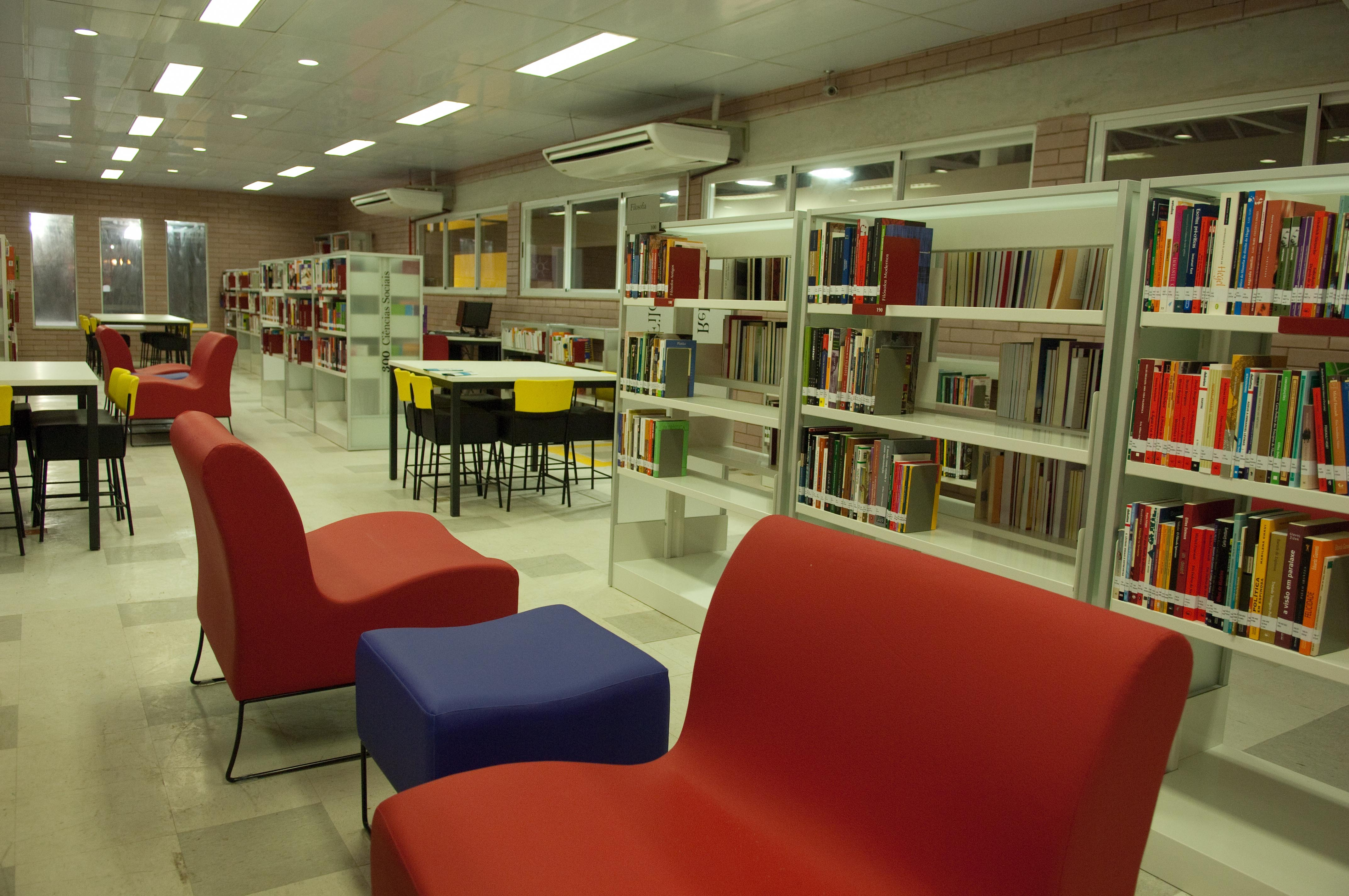 29/04/2010. Crédito: Pedro França/Minc. Brasil. Brasília-DF. Inauguração da Biblioteca Parque de Manguinhos - RJ